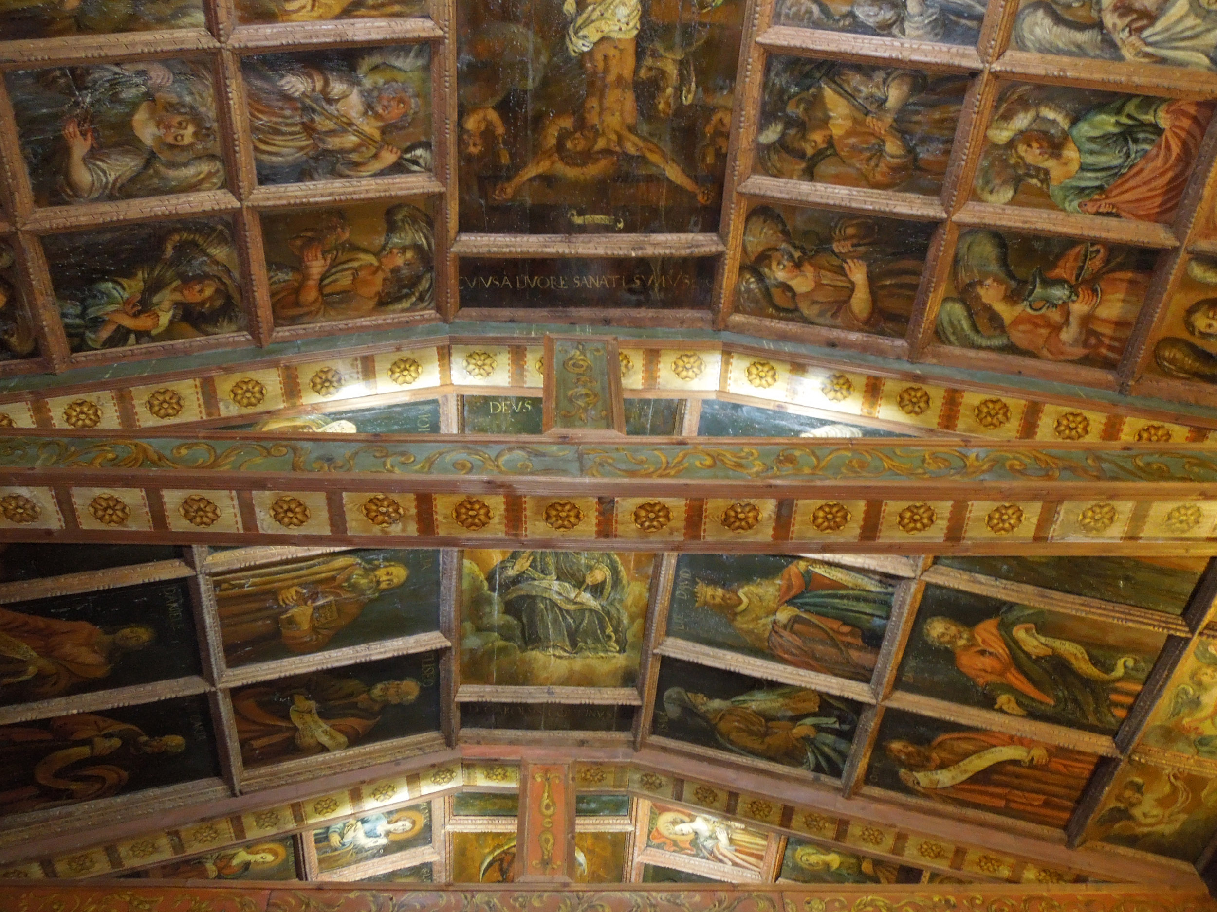 Particolare del soffitto ligneo dipinto della Chiesa di San Bartolomeo di Villa Popolo in provincia di Teramo.